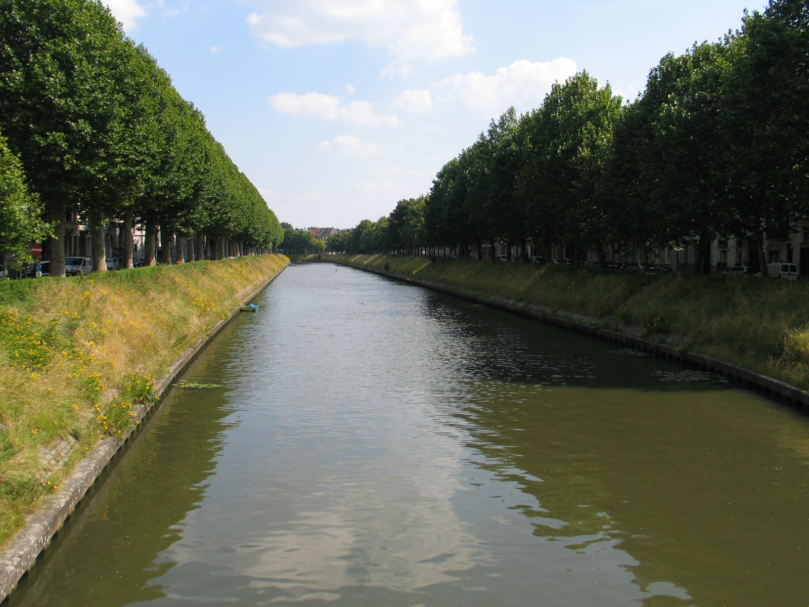 de Coupure in Gent (België)